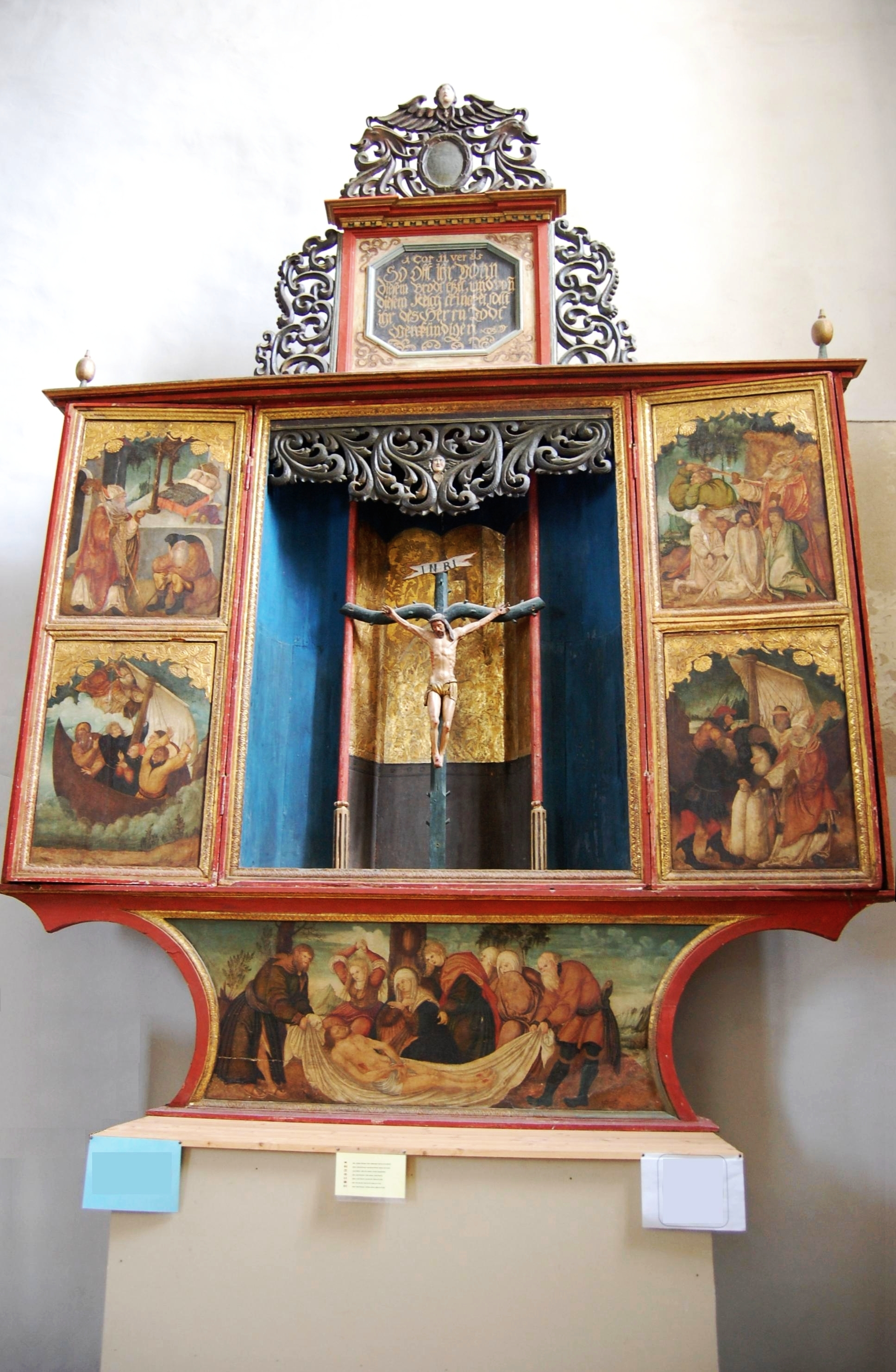 Segesvár - Felsőváros - Evangélikus vártemplom - szárnyas oltár